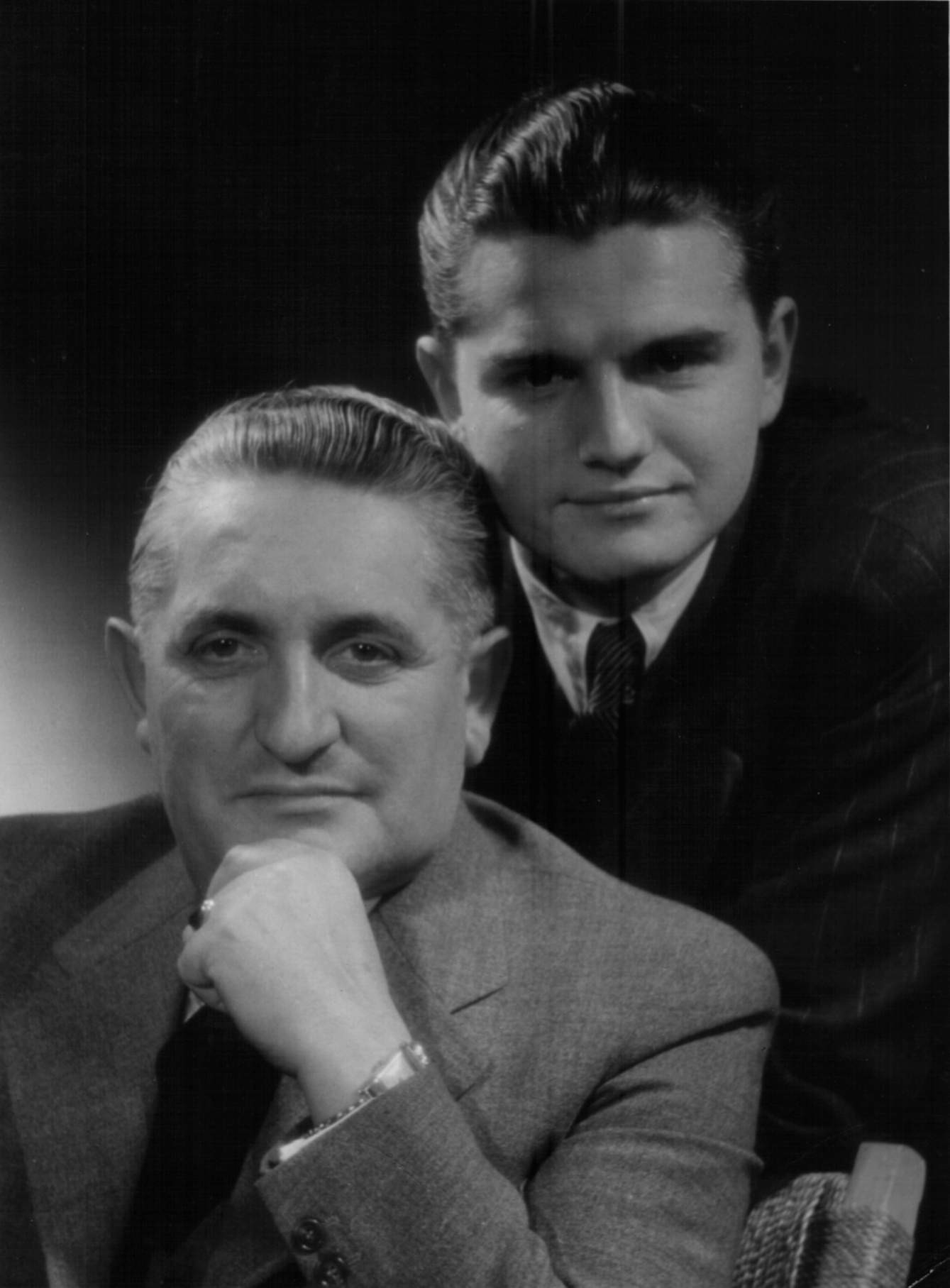 Der junge John H. Noble mit seinem Vater Charles